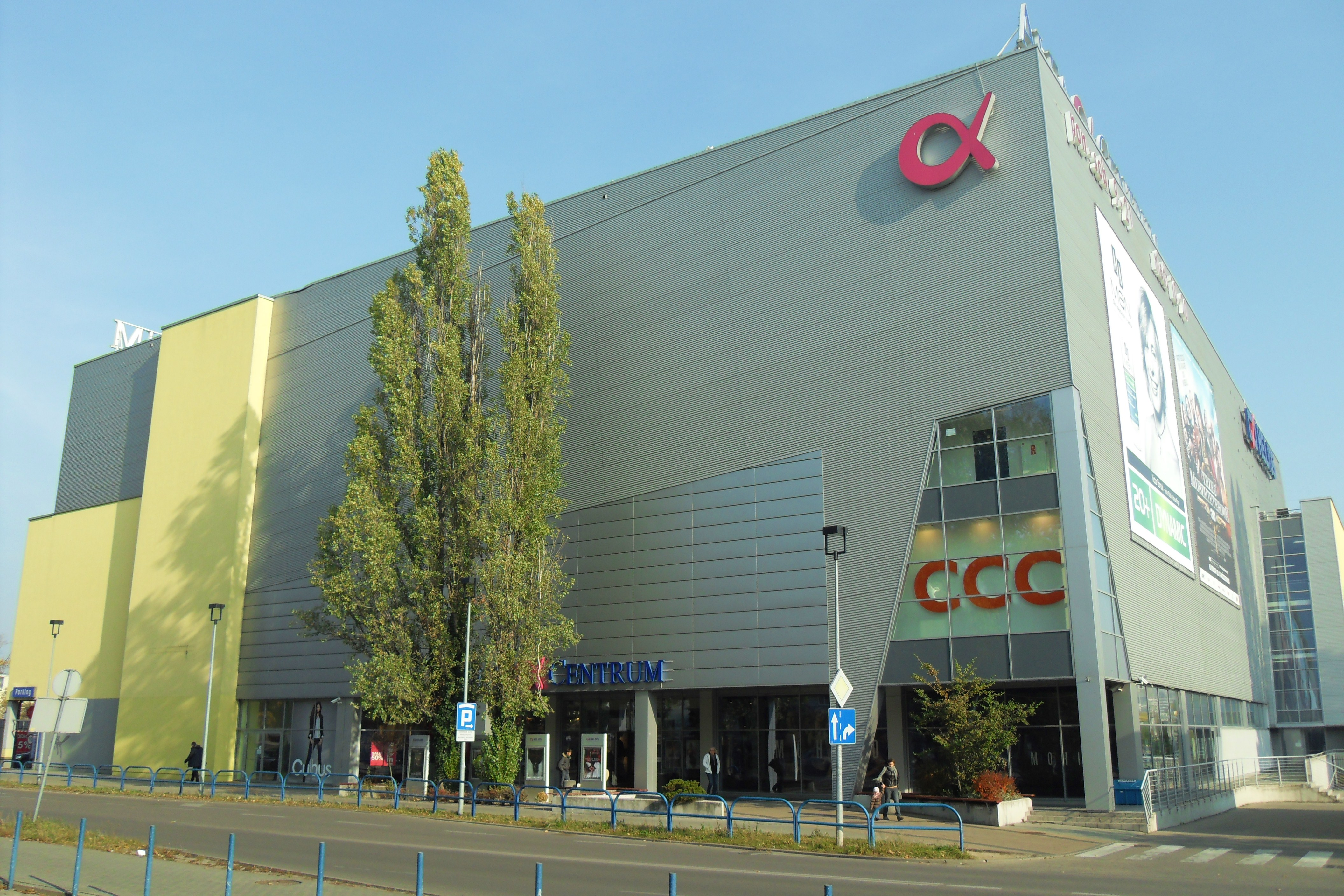 Gdańsk Przymorze Małe. Galeria handlowa "Alfa Centrum", ul. Kołobrzeska 41C.